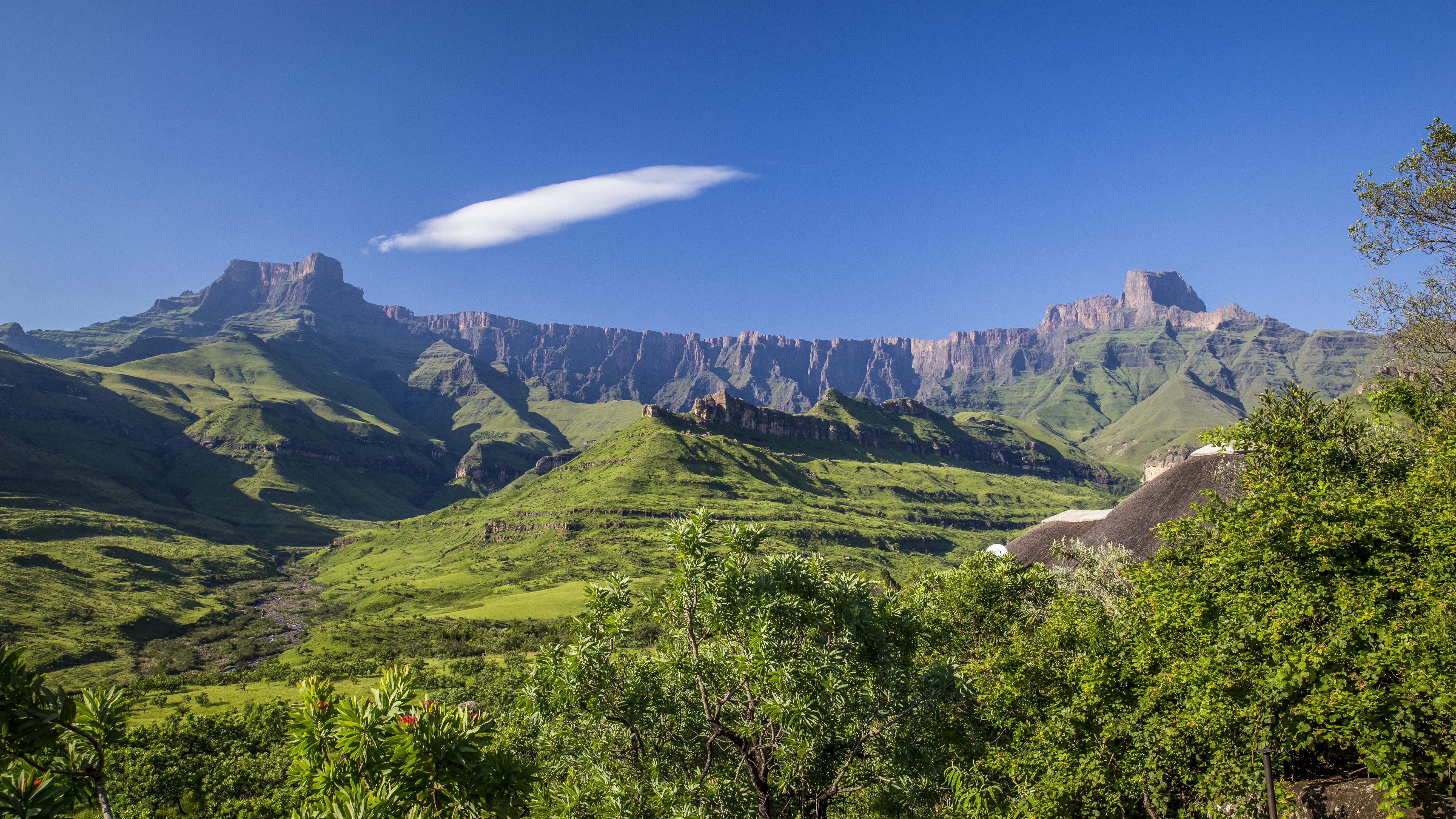 Photos at Royal Natal National Park